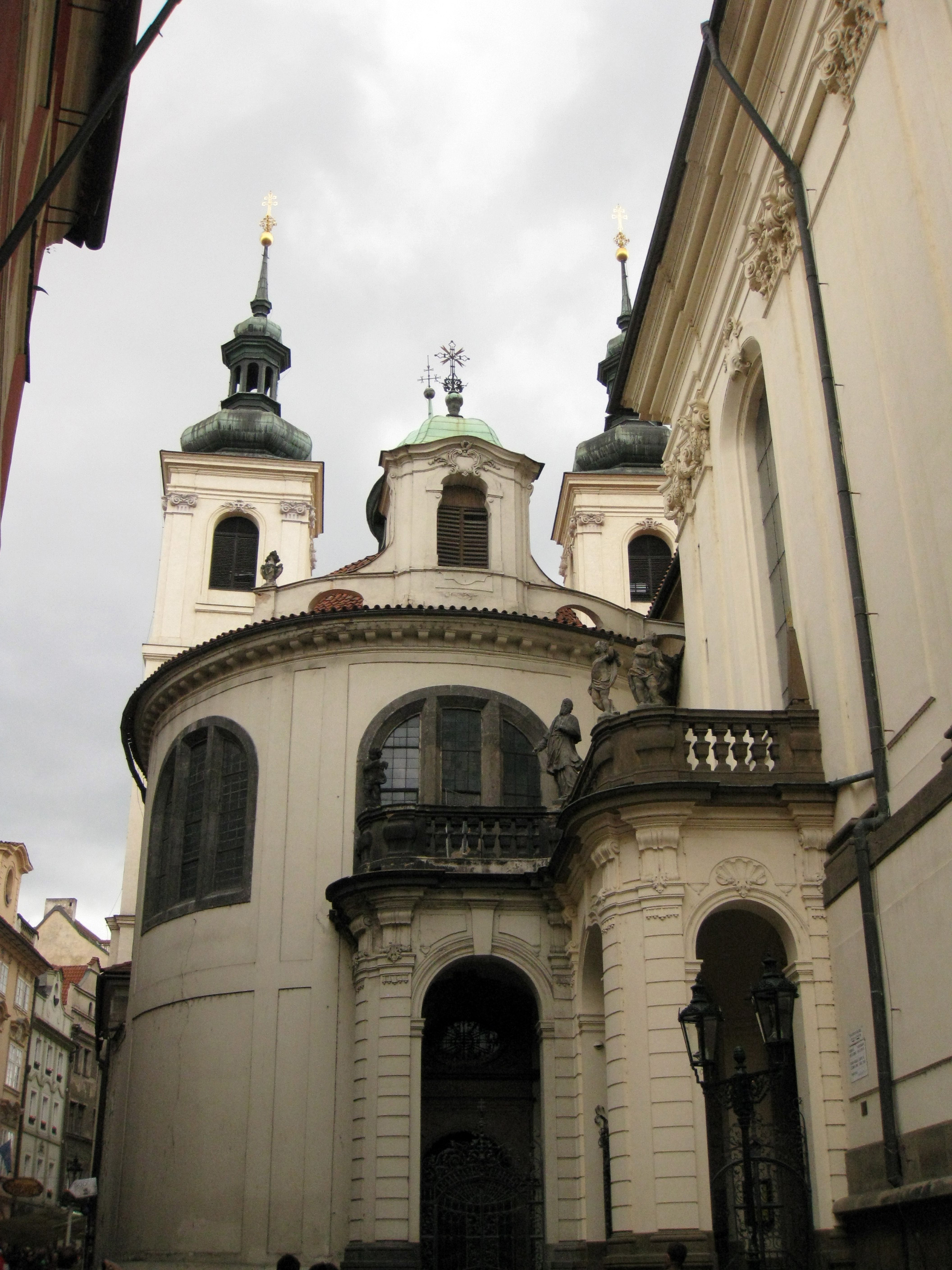 Praha 1-Staré Město, Karlova ulice, kostely sv. Klimenta a Nejsv. Salvátora a kaple Nanebevzetí Panny Marie, které jsou součástí Klementina.